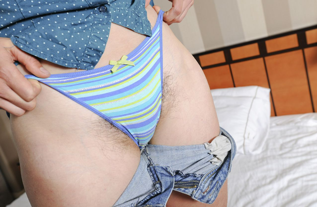 Schamhaare quellen aus der Unterhose hervor.